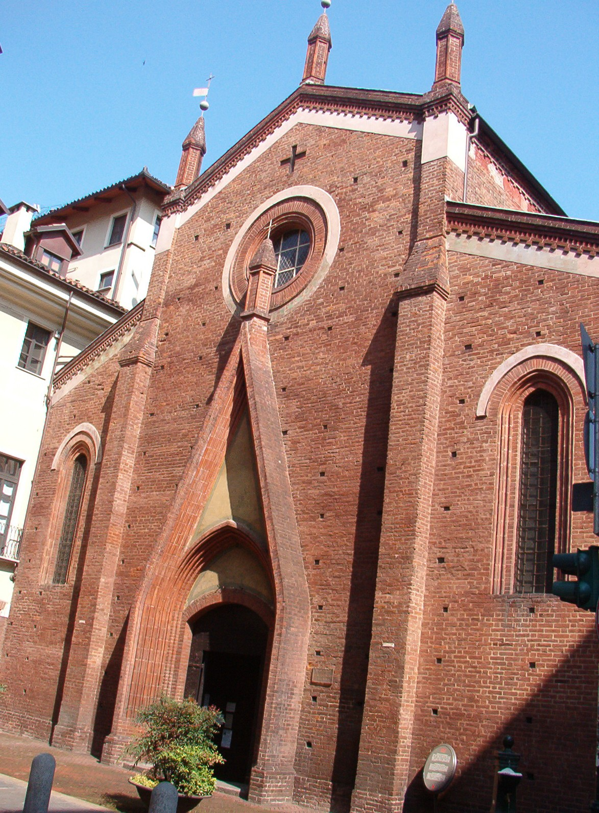 Chiesa di san Domenico - Torino - Italy